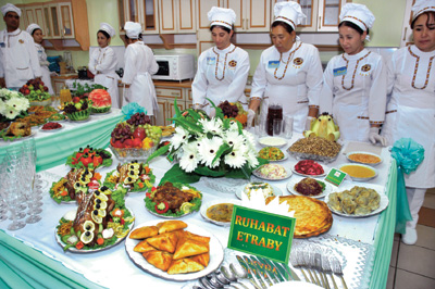 Turkmen tagamlary